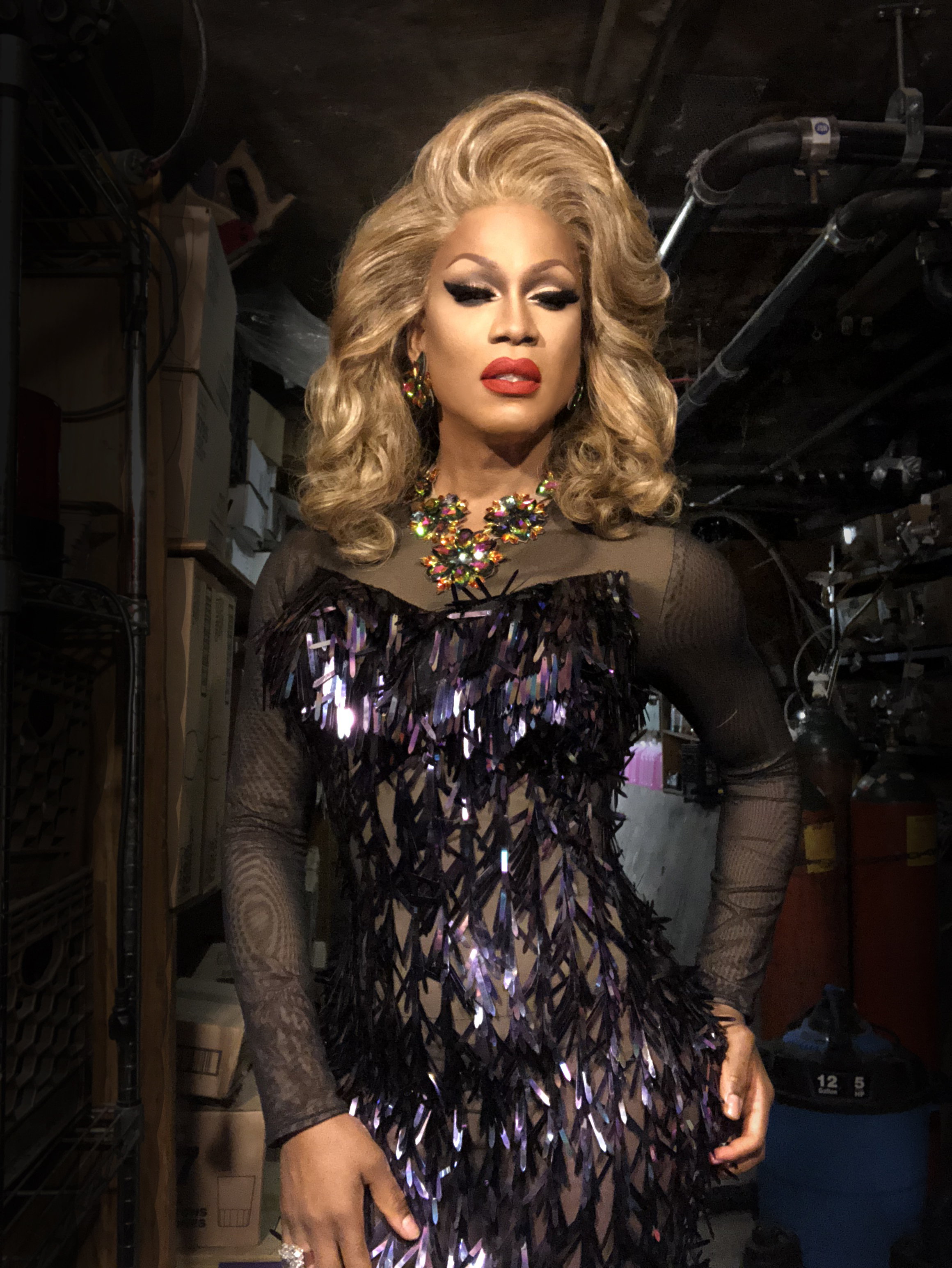 Shequida 2019